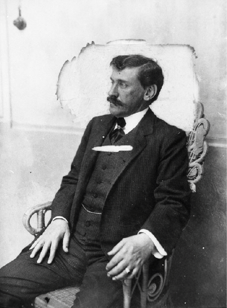 Julio Botet